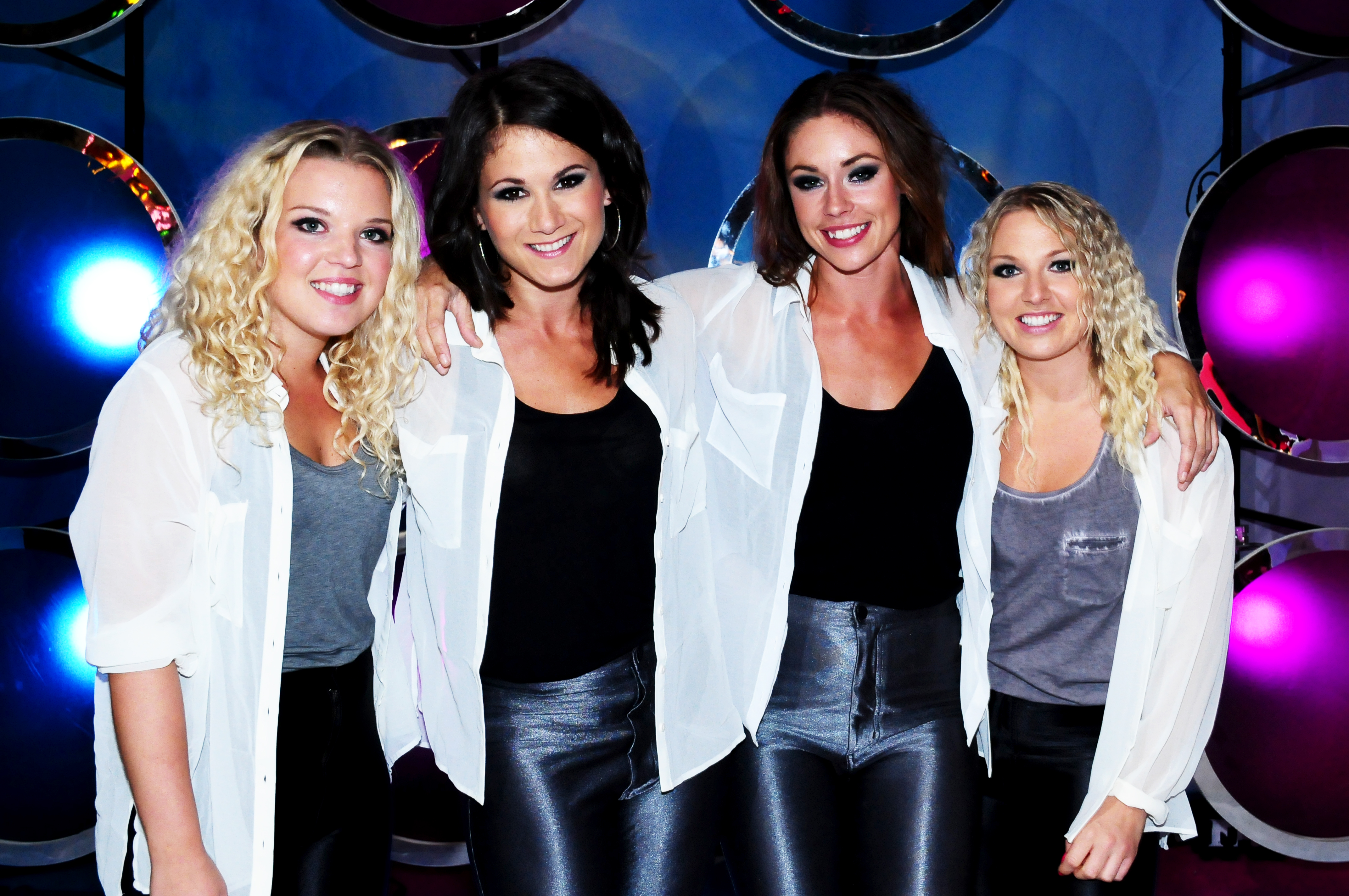 Urban Angels på Sommarkrysset, här med tjejerna (f v) Emilia Sandquist, Gabriella Kaiser, Maria Andersson och Bianca Fernström